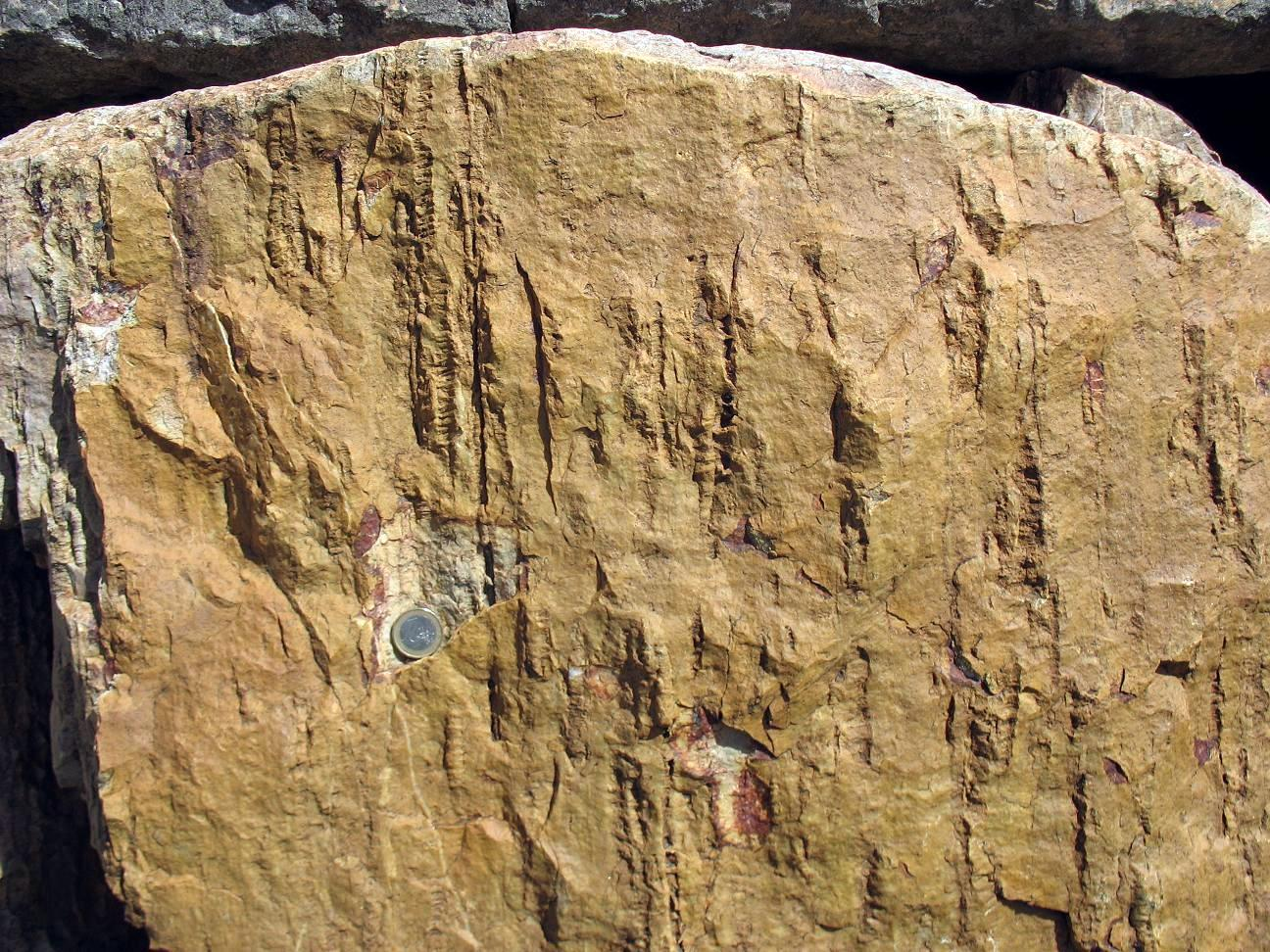 Skolithos dufrenoyi y Skolithos ichnosp. Cuarcita armoricana, Ordovícico. La roca forma parte de los sillares del yacimiento celtibérico de El Castellar. Berrueco, Zaragoza, España. Secciones, vista lateral. (Moneda de escala: 1 EUR, Ø 23,25 mm)